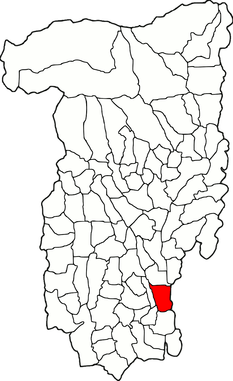 Lage der Gemeinde Prundeni im Kreis Vâlcea (RO).